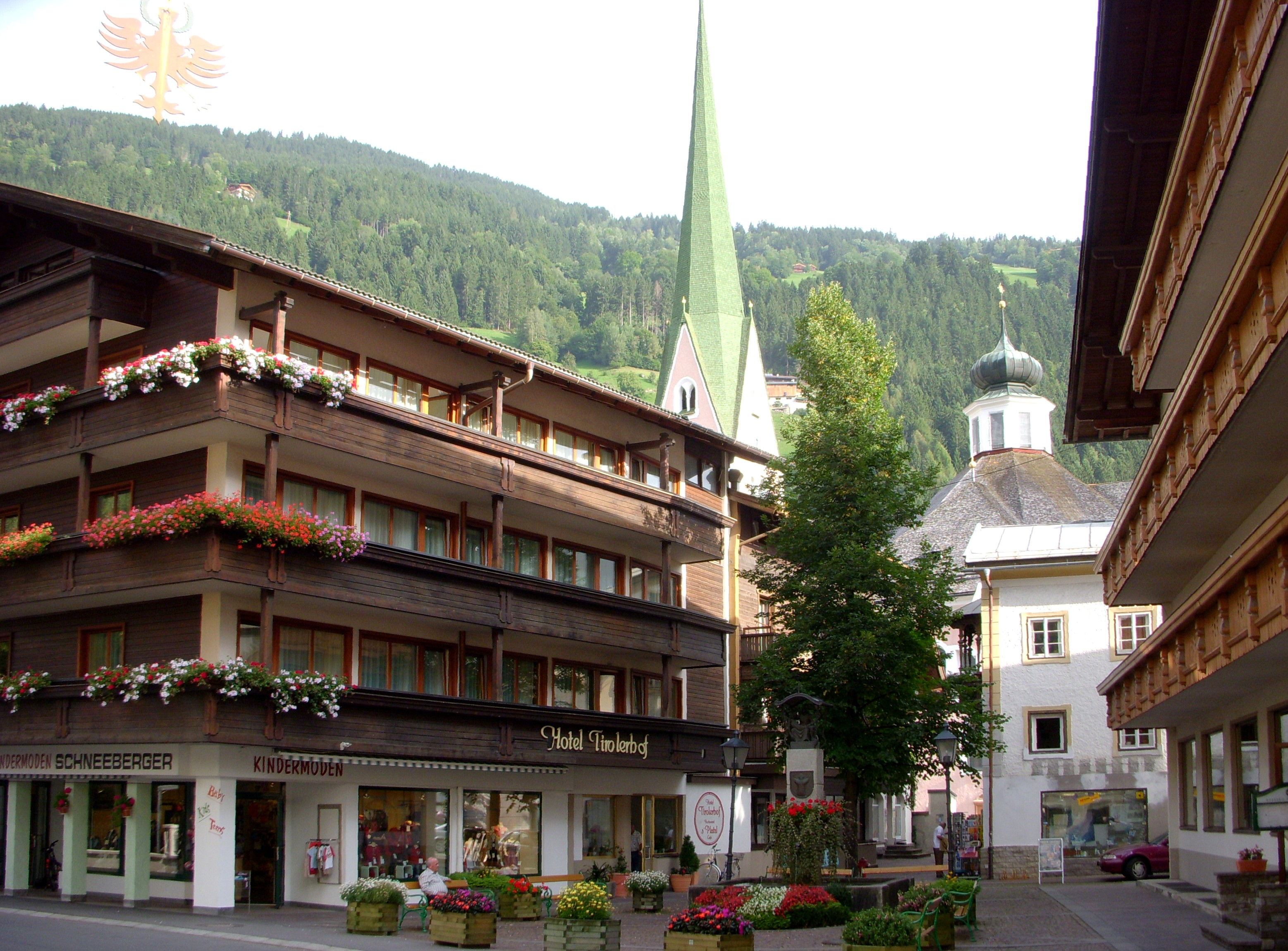 Zell am Ziller, Österreich